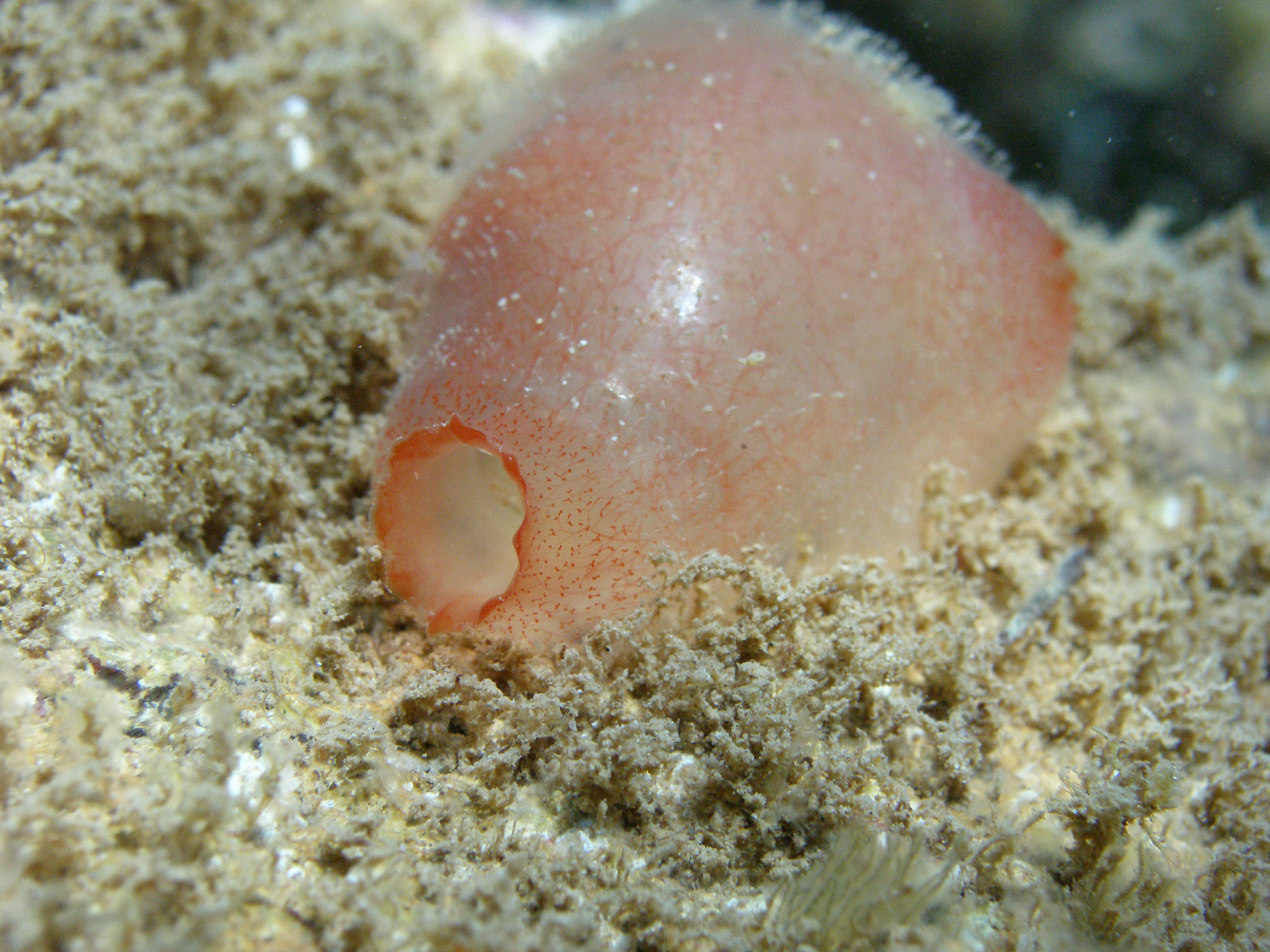 Ascidia spp